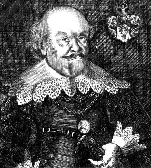 Doct. Petrus Fritze Spandovien, 1584-1648